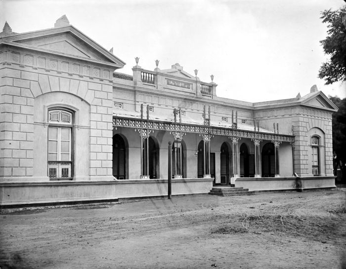 Negatief. Militaire kantine, Surabaya, Java